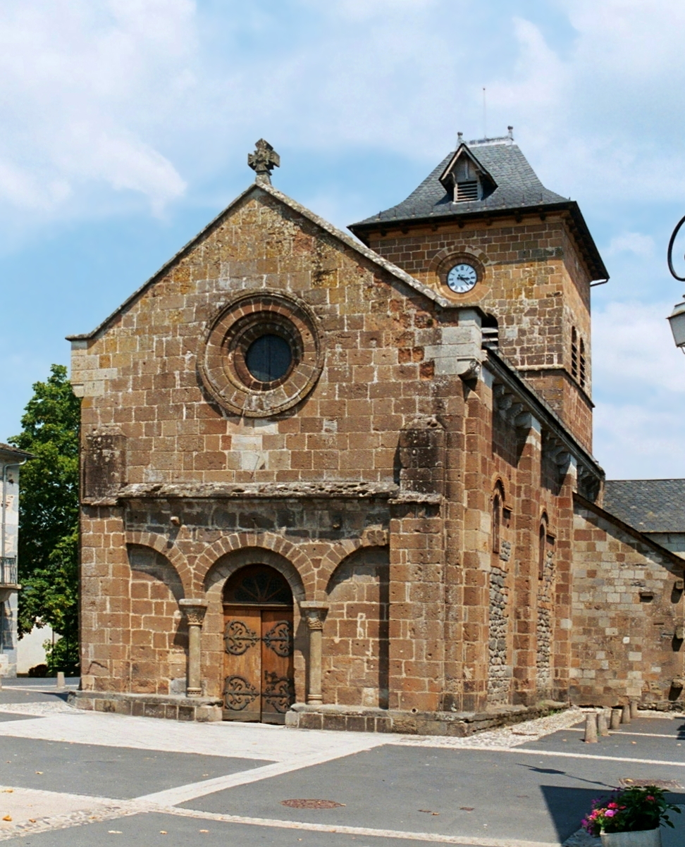 France - Auvergne - Cantal - Église Sainte-Croix de Saignes